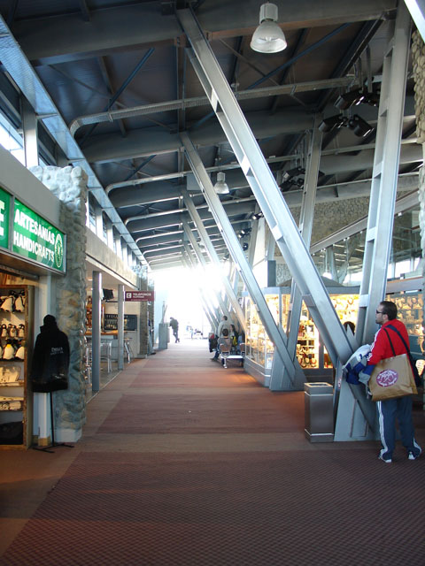 Interior del Aeropuerto Comandante Tola de El Calafate.